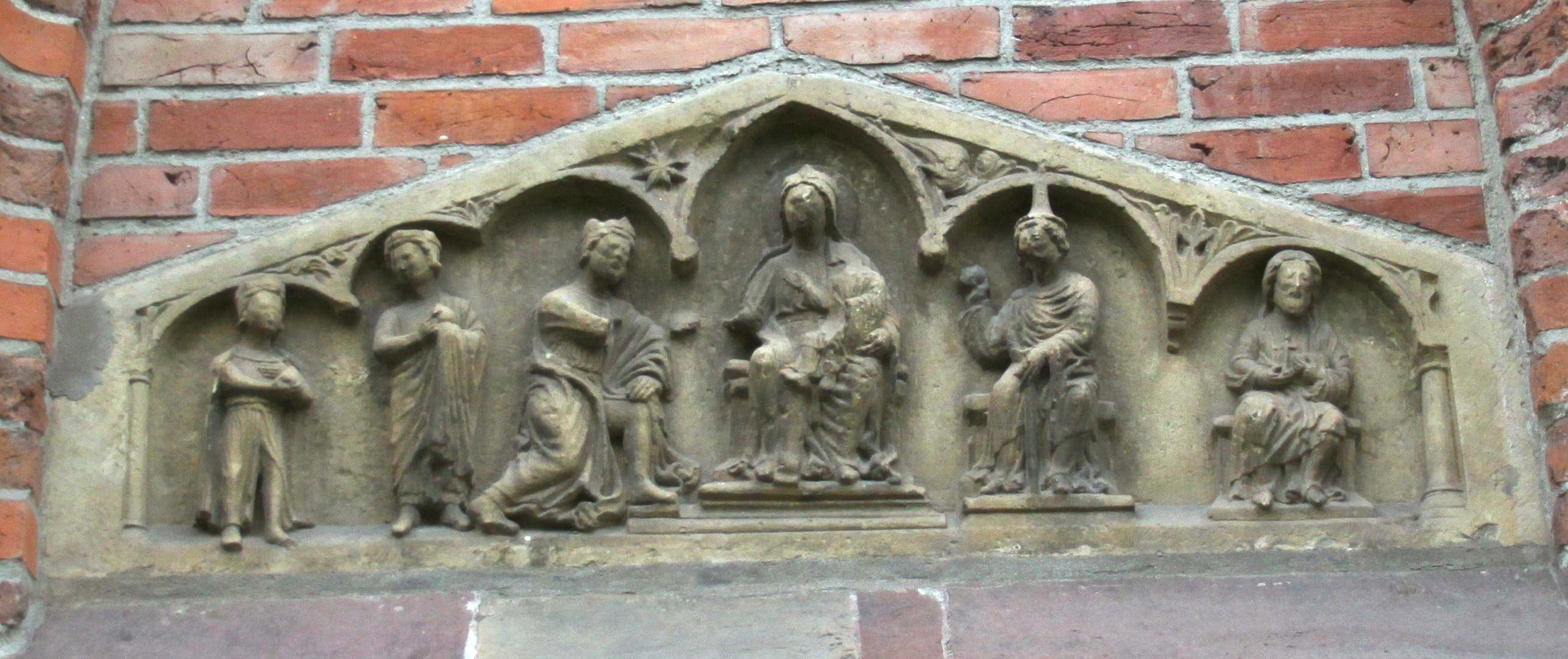 Torstein der Ludgerikirche